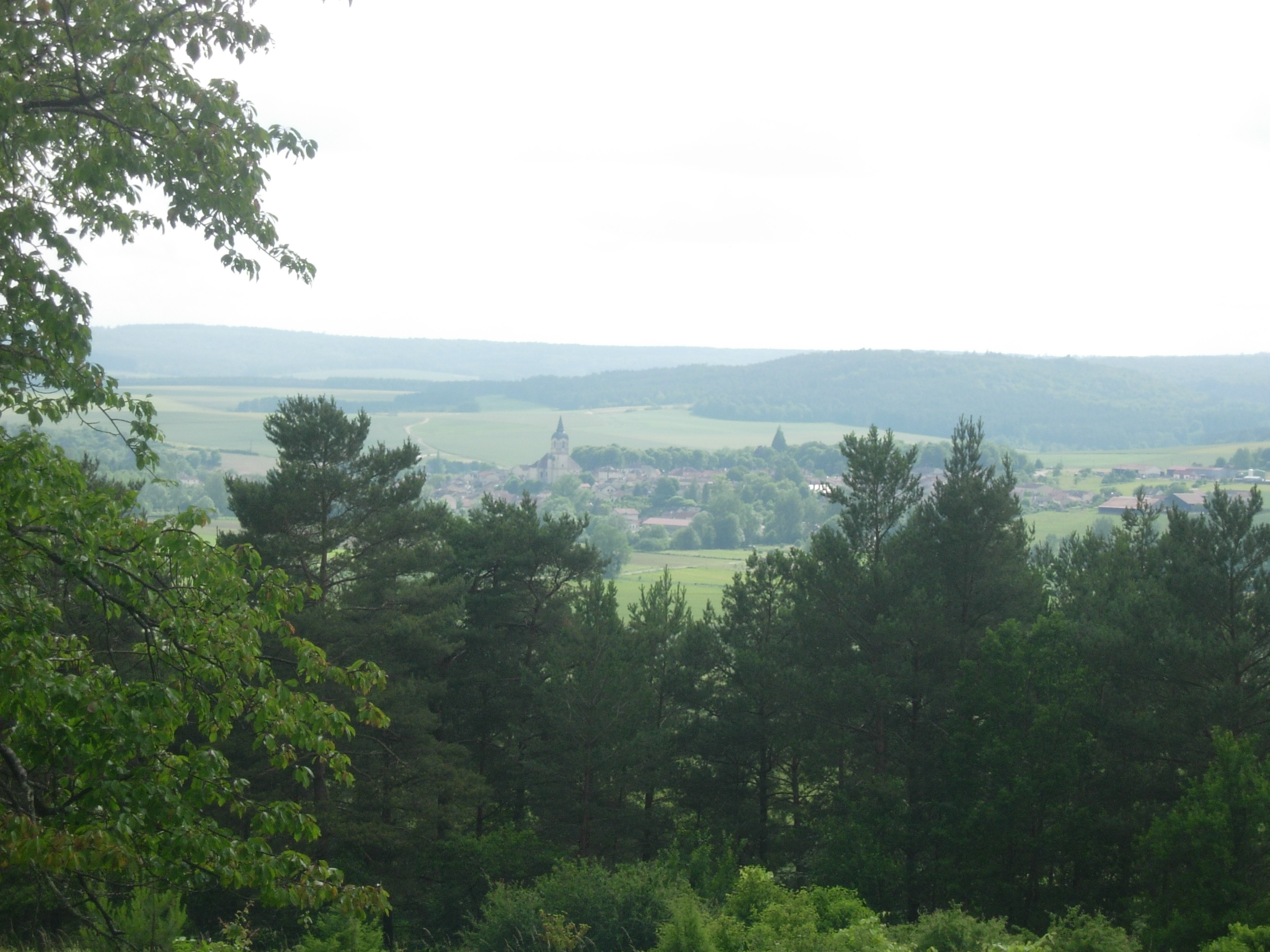 Laferté sur Aube vue depuis les bois